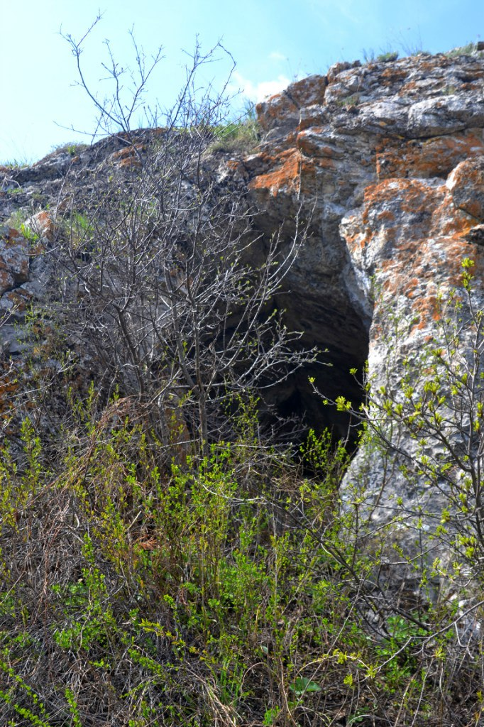 Капова пещера (Шульган-Таш): Капова пещера (Шульган -Таш),д. Иргизлы,Бурзянский район, Башкортостан This image is related to the protected area of Russia number 0220101